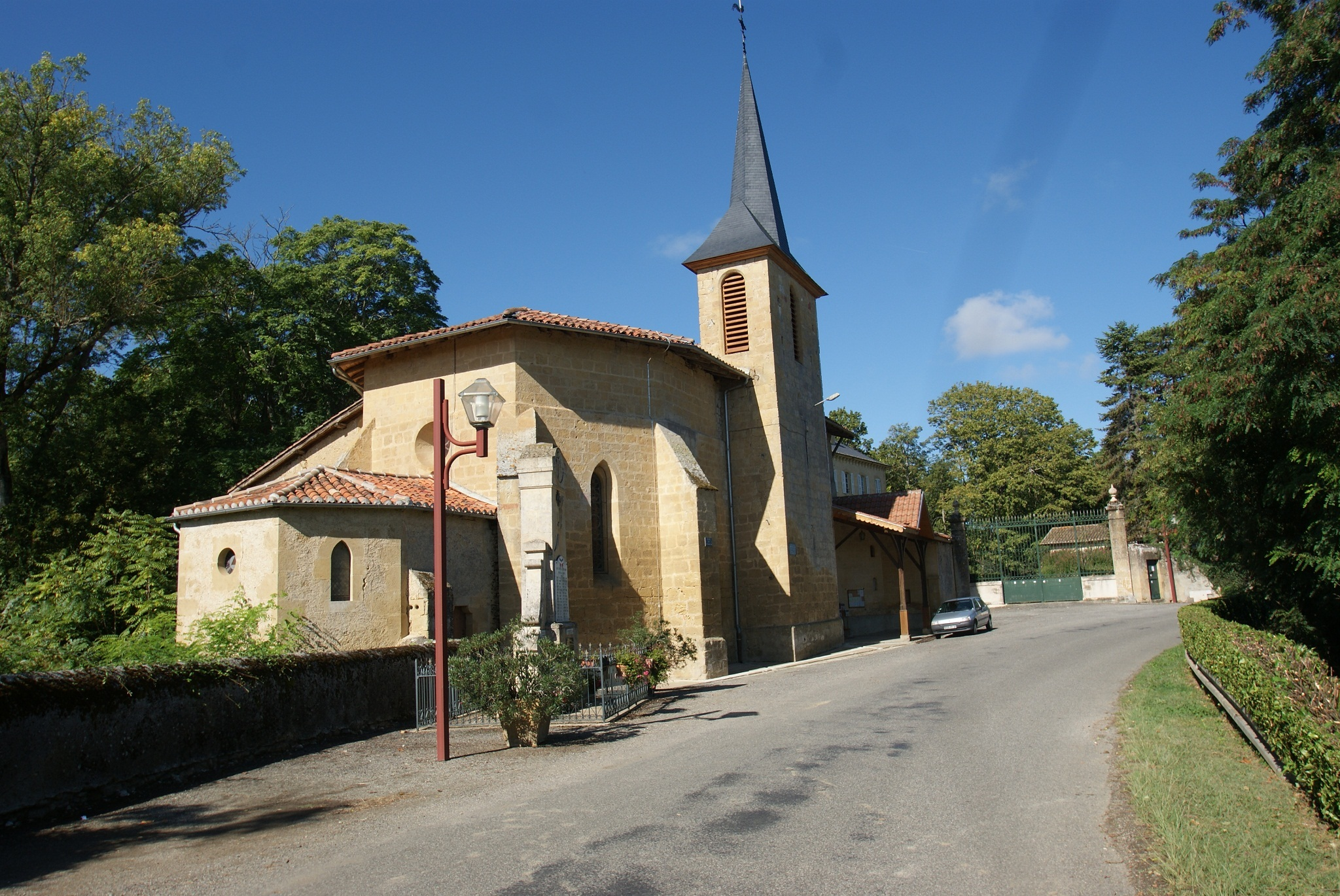 De kerk van Péguilhan langs de D90.